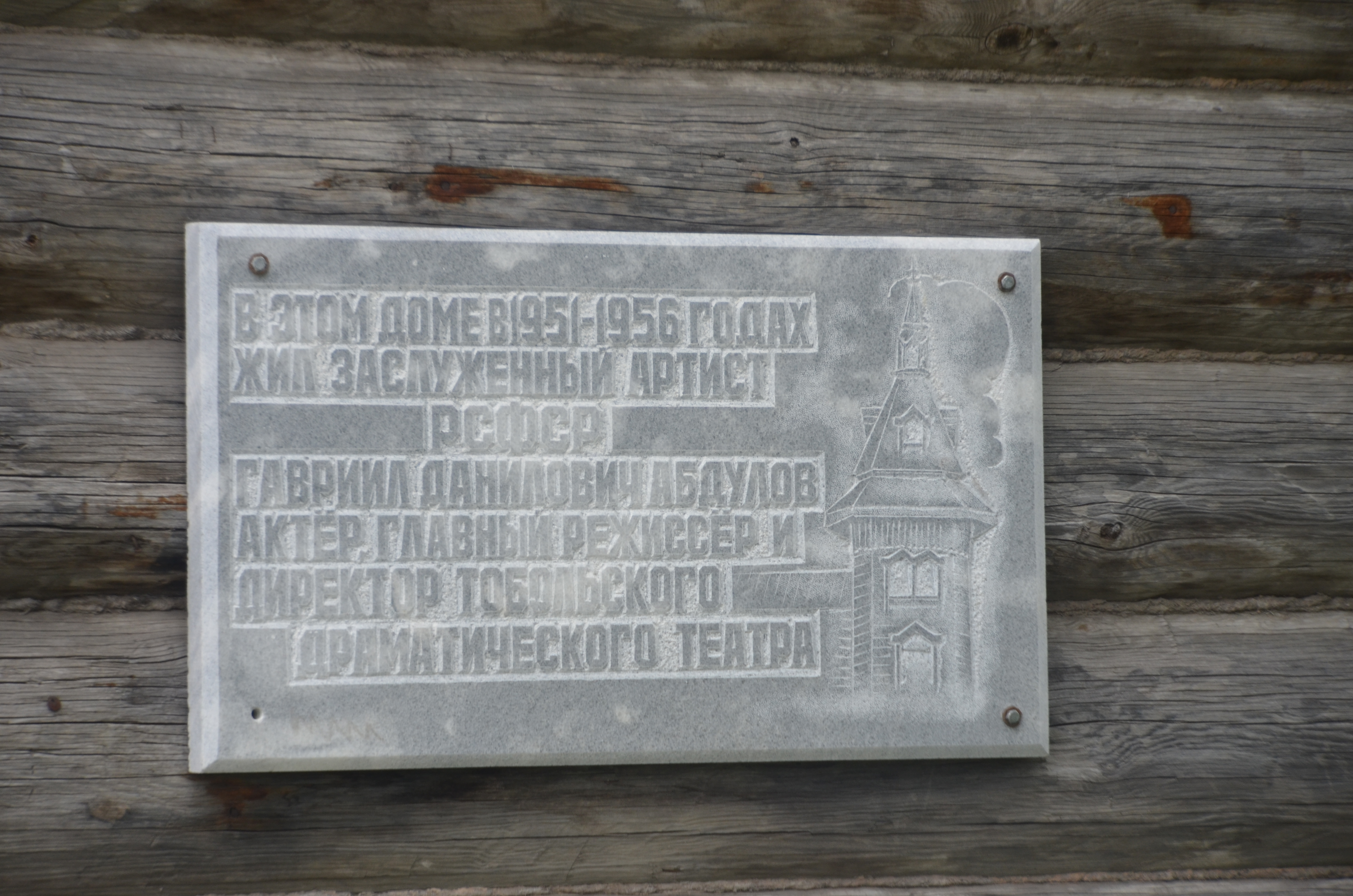 Дом жилой: улица Ленина, 32, Тобольск, Тюменская область